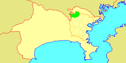 Map of Aoba-ku, Yokohama, Kanagawa-prefecture, Japan